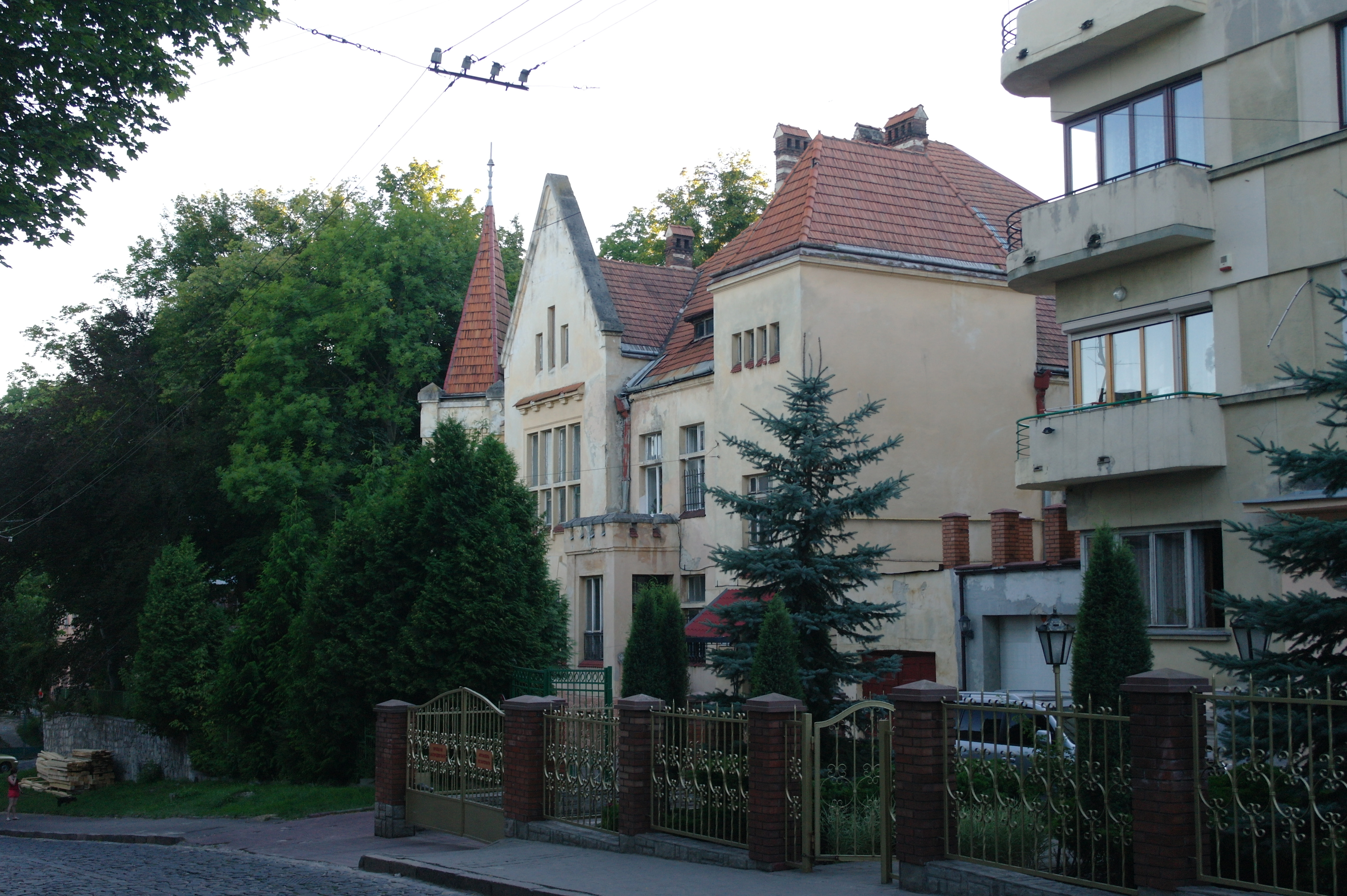 Львів, Драгоманова, 58